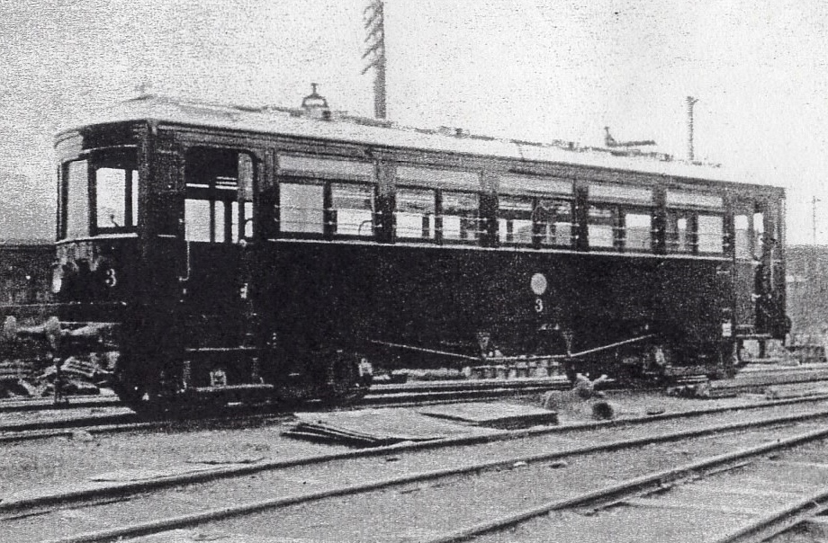 渥美電鉄デホハ1形電車